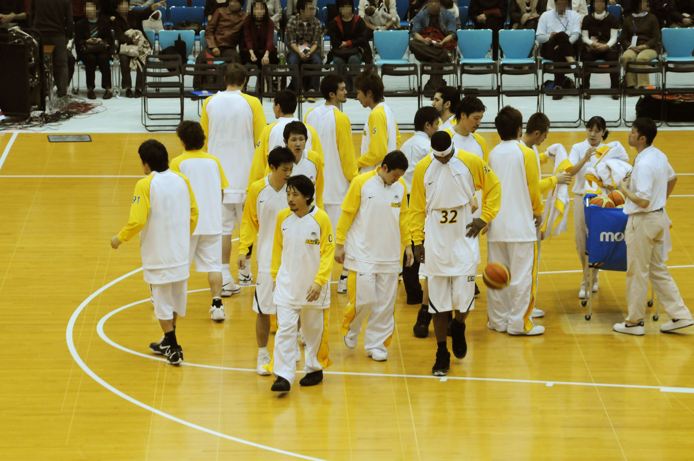 リンク栃木ブレックス、とどろきアリーナで。